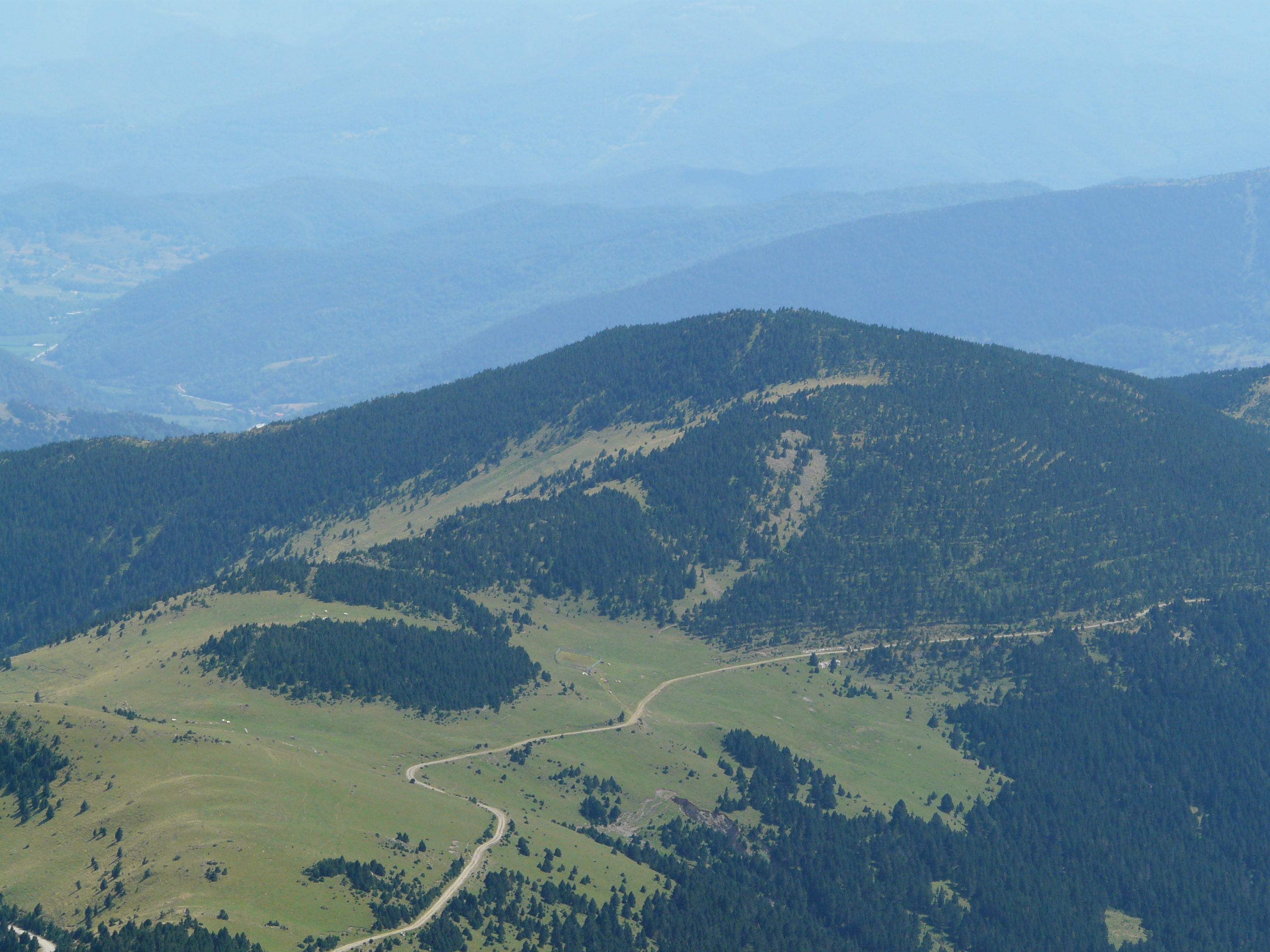 Fotografia presa en una ascensió al Costabona des de la Collada Fonda.